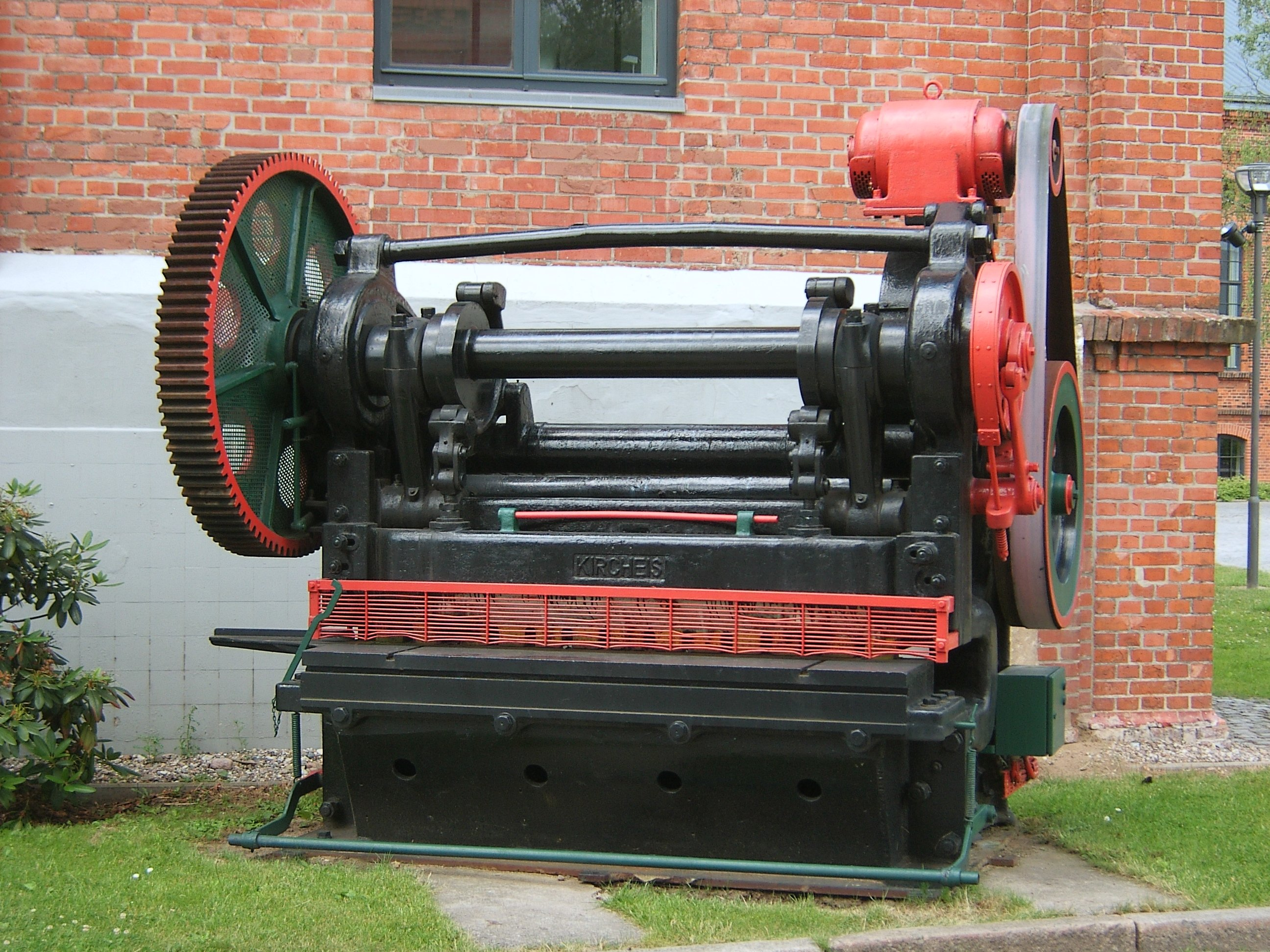 Hamburg, Bahrenfeld, Otto-von-Bahrenpark